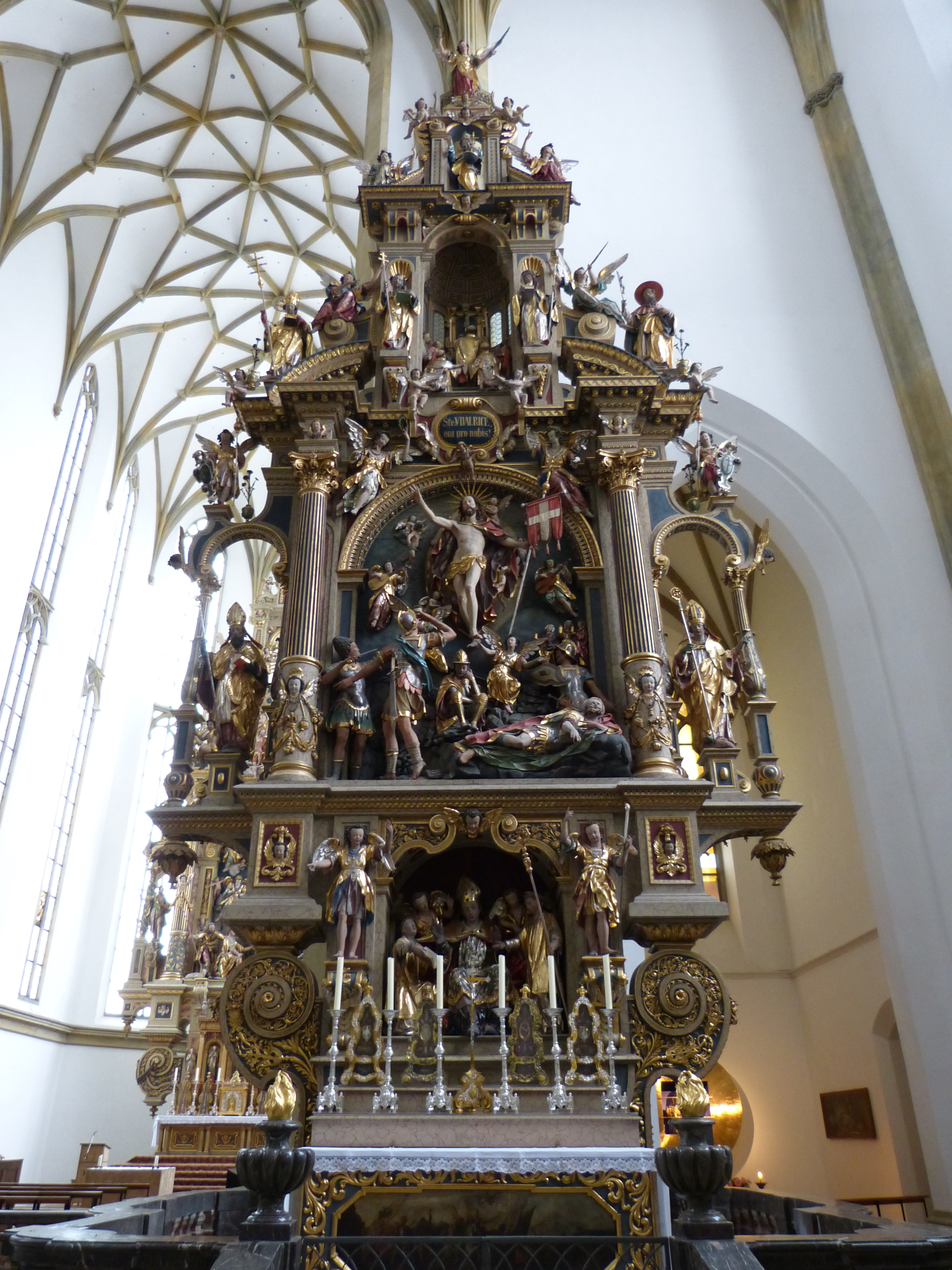 St. Ulrich und Afra, Augsburg, Bayern Rechter Seitenaltar, St. Ulrich und Afra, Augsburg, Bayern